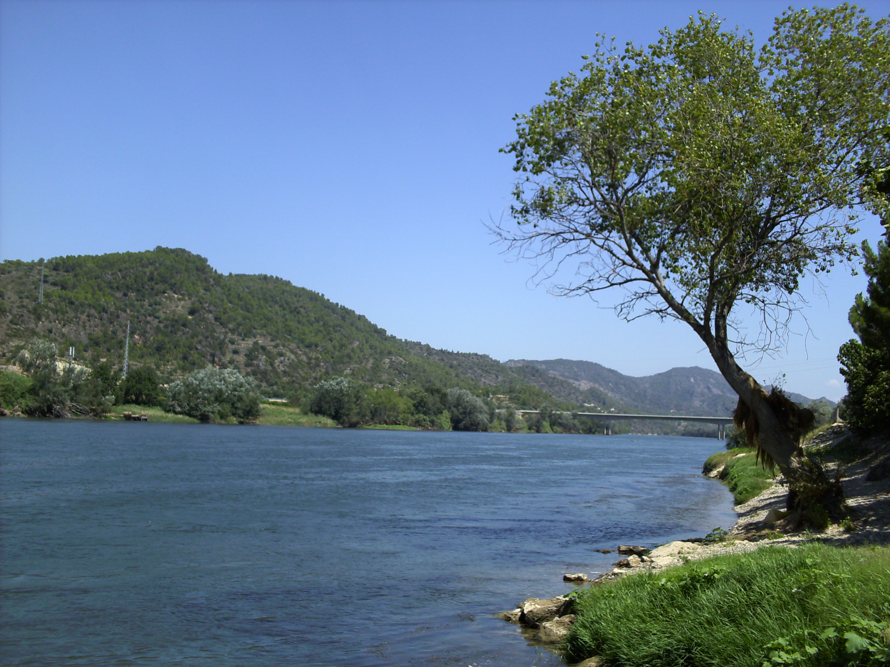 Lo riu Ebre al seu pas per Benifallet amb lo pont del llaguter al fons